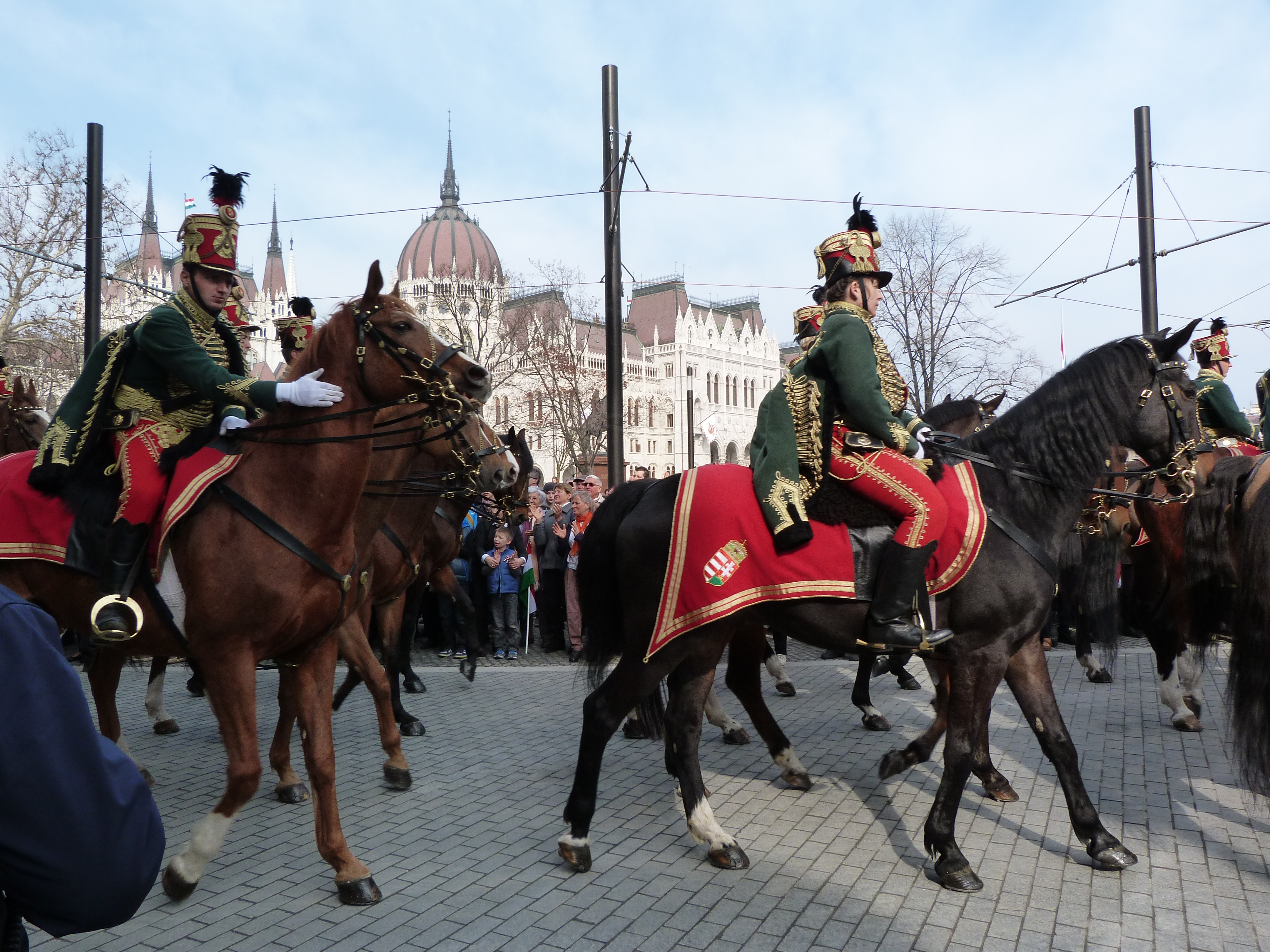 A felvétel 2014. március 15 -én készült Budapesten, a Kossuth téren. Huszárok felvonulása. ©© Derzsi Elekes Andor, Budapest, 2014, A kép és filmfelvételek egészben, vagy részletekben másolását, bármilyen úton történő sokszorosítását és felhasználását a szerző ellenérték nélkül, jogutódjaira is kihatóan megengedi. Az engedély kiterjed a kereskedelmi célú hasznosításra is. Kéri azonban nevének feltüntetését a felhasználás során. A Metapolisz sorozat valamennyi képe és filmje Creative Commons alatti valamint kereskedelmi - for profit - célra is felhasználható. Ajánlott hivatkozás: Derzsi Elekes Andor: Metapolisz DVD line